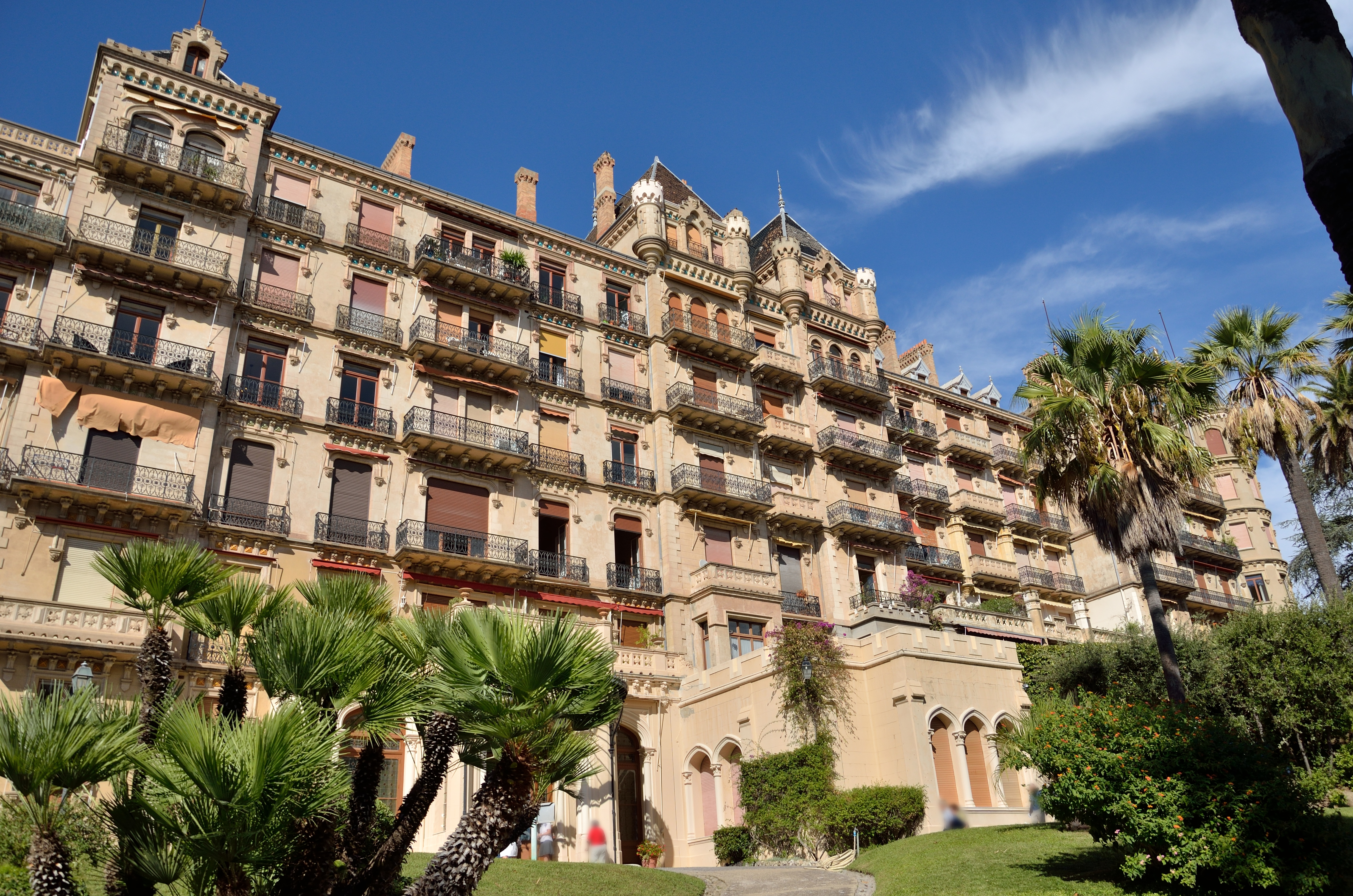 Château Vallombrosa, devenu l'hôtel du Parc puis aujourd'hui transformé en appartements, à Cannes (Alpes-Maritimes)